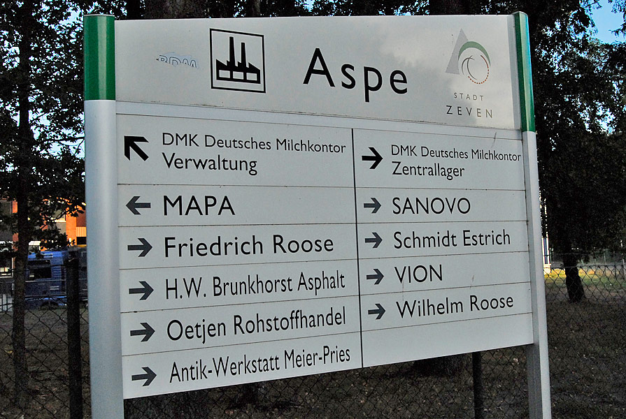 Zeven Aspe Firmen